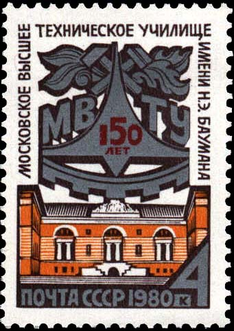 Почтовая марка СССР, выпущенная 1 июля 1980 года к 150-летию со дня основания Московского Высшего технического училища имени Н. Э. Баумана. На марке изображены фирменный знак училища, молот, гаечный ключ, лавровая и дубовая ветви, учебный корпус МВТУ (бывший Слободской дворец). Художник — А. Калашников. Номер — 5091 (ЦФА). Тираж — 4,9 млн экз. Описание — по изданию «Почтовые марки СССР 1980: Каталог», М., Радио и связь,1981